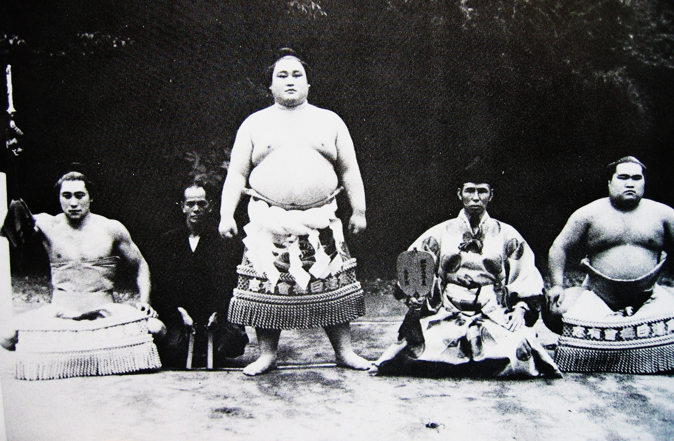 照国の土俵入り（昭和18年）